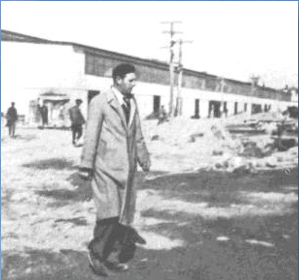 Иван Комзин на строительстве текстильного комбината в Кайсери (Турция)